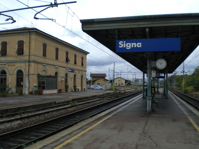 Piazzale binari e fabbricato viaggiatori della Stazione di Signa